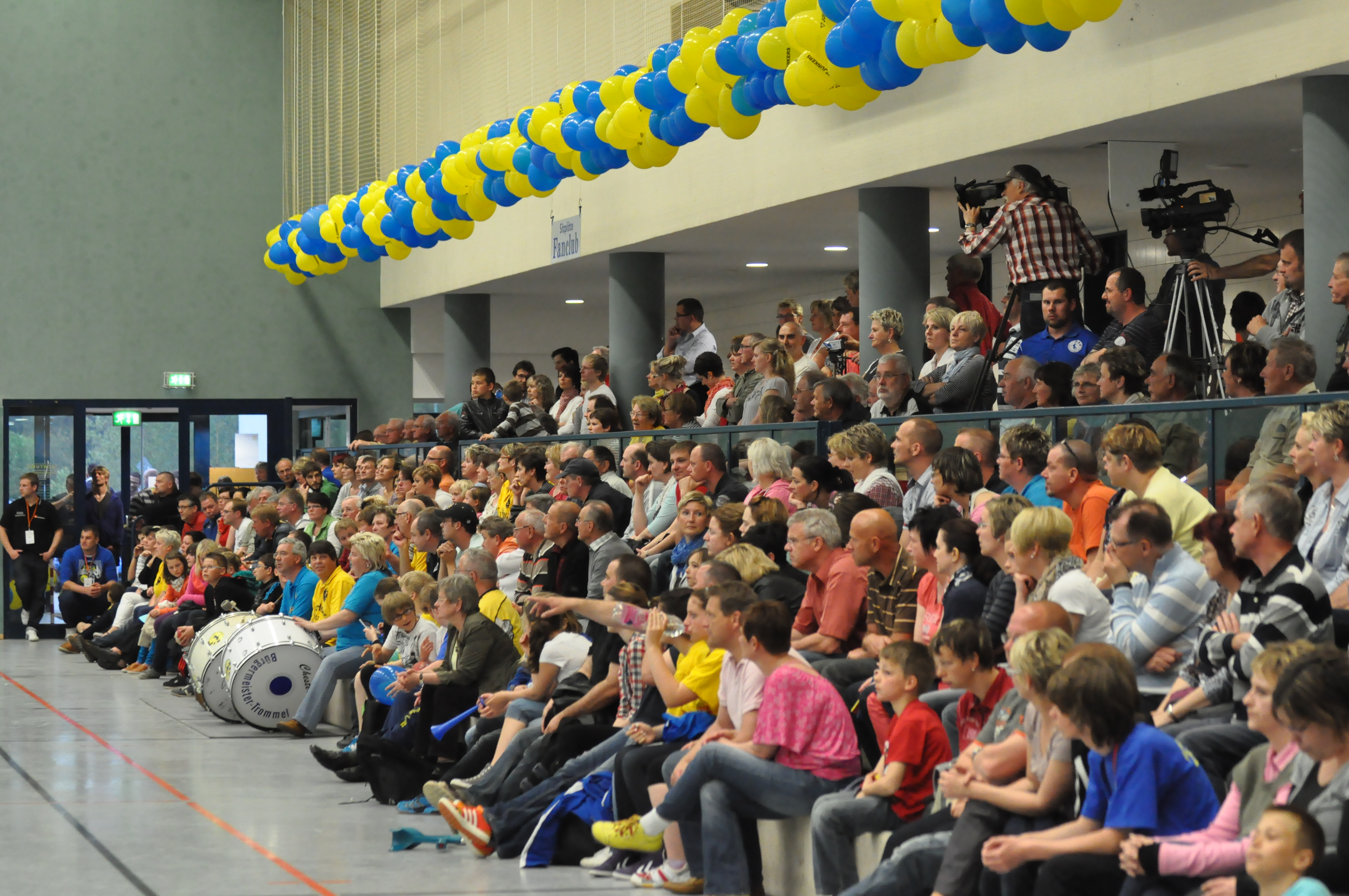 zu